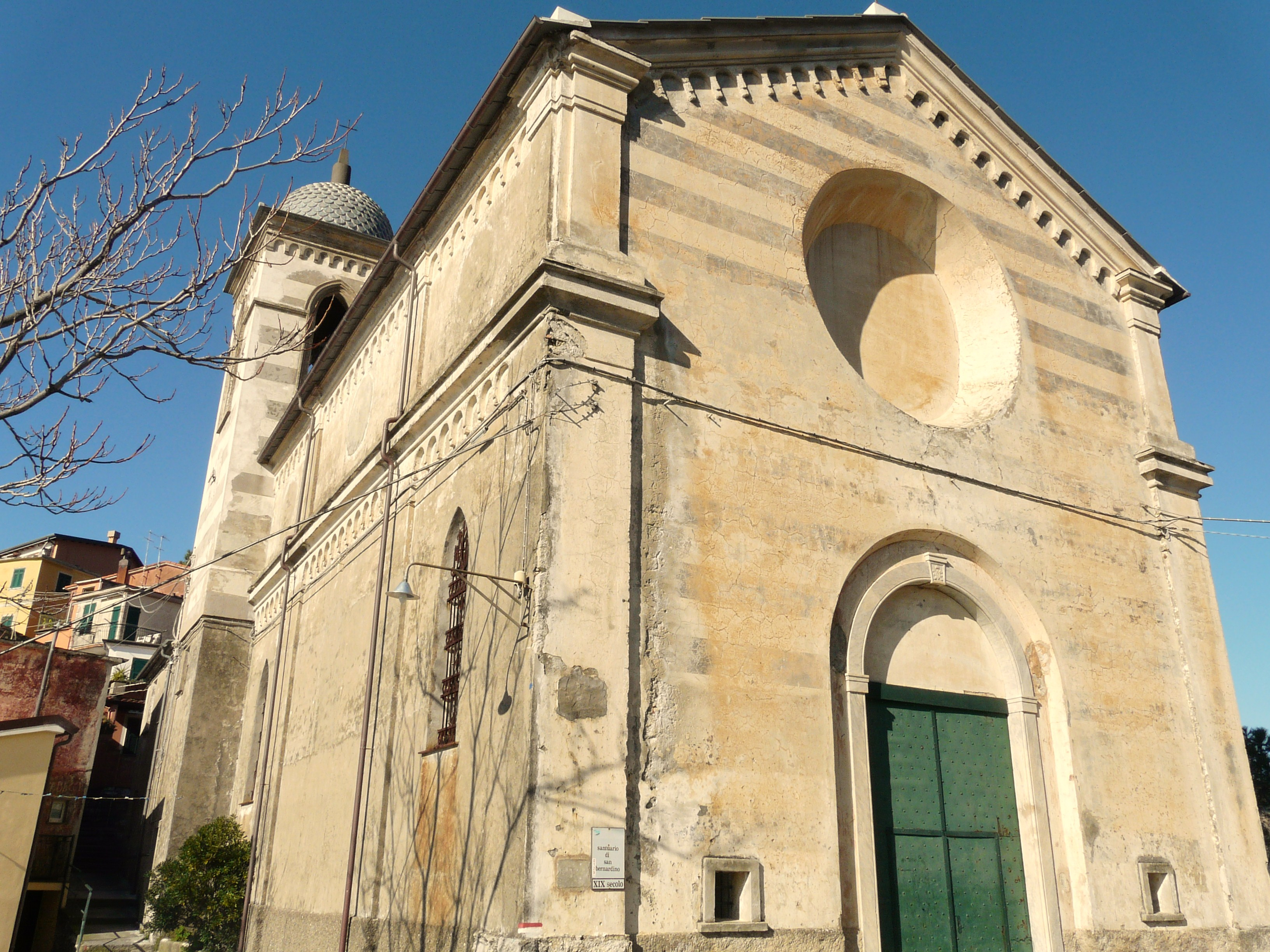 Santuario di San Bernardino, Vernazza, Cinque Terre, La Spezia, Liguria, Italia